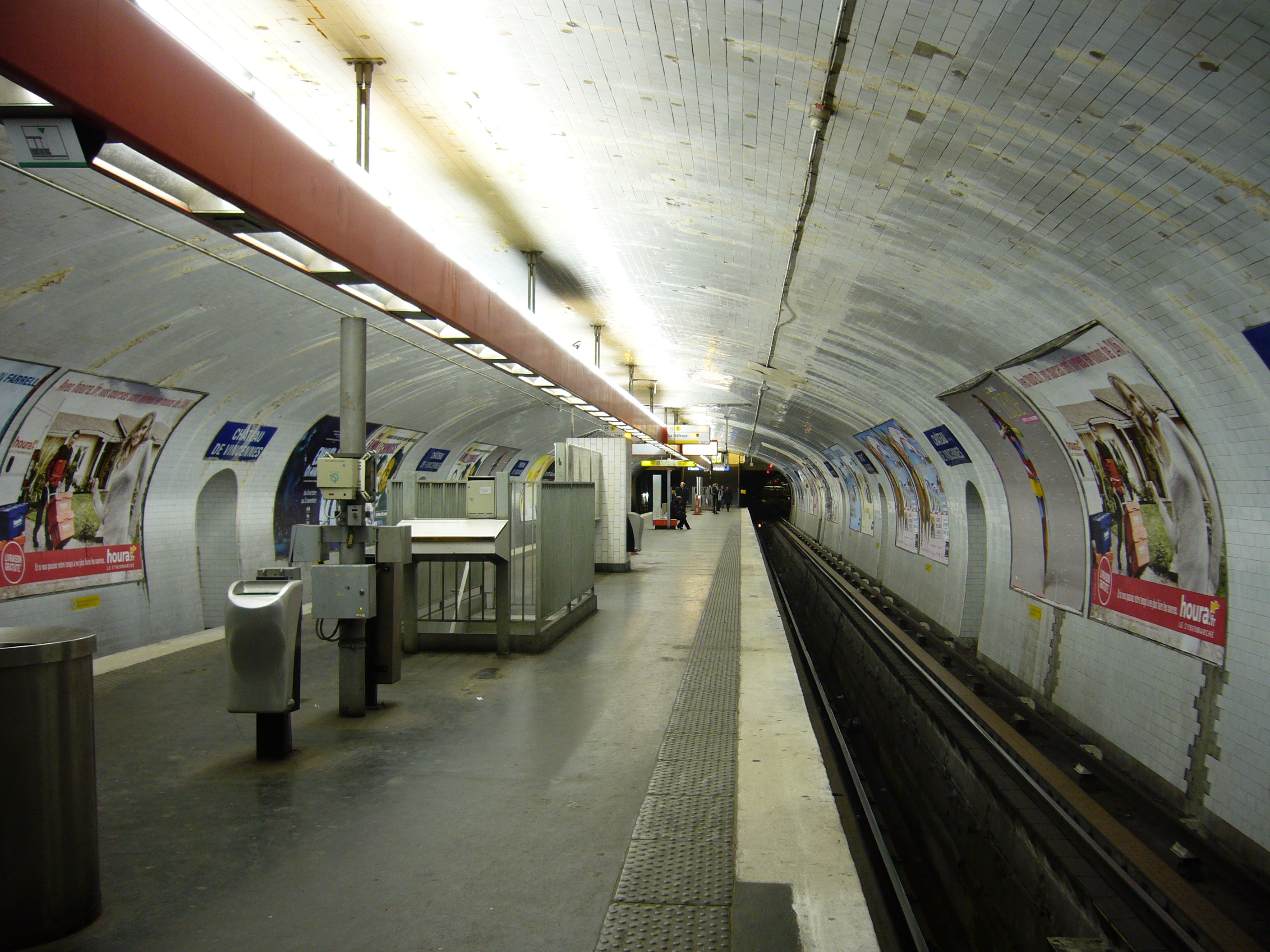 Station Château de Vincennes sur la ligne 1 du métro de Paris.